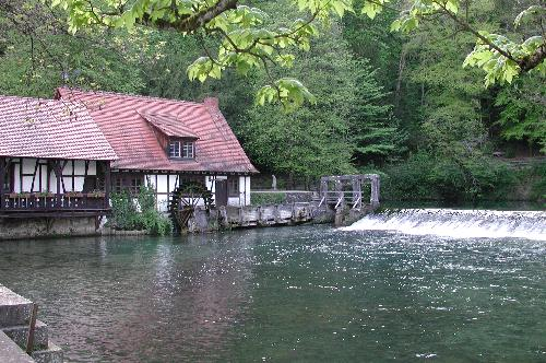 Direkt neben dem sagenumwobenen Blautopf befindet sich ein historisches Hammerwerk, das durch das Quellwasser des Blautopfes angetrieben wird. Foto: Michael Linnenbach, GNU FDL